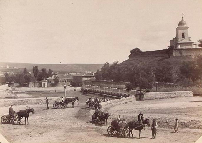 Poalele Colinei Măzărachi, Chişinău, sf. sec. al XIX-lea. Imagine preluată din Albumul Kondratkov, anul 1889.